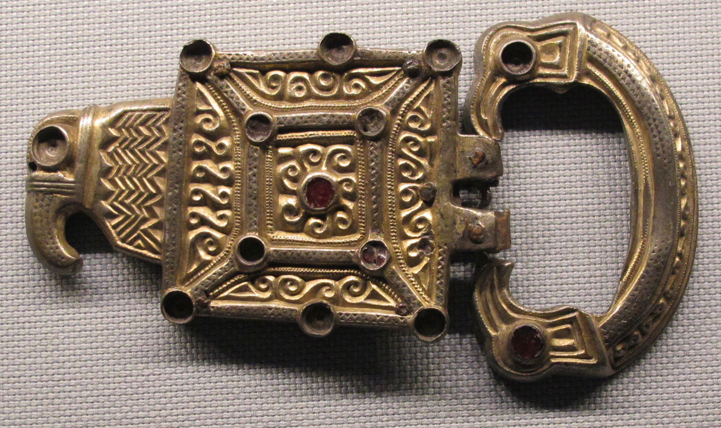 Primo tesoro di cosoveni de jos, fibbia, V sec